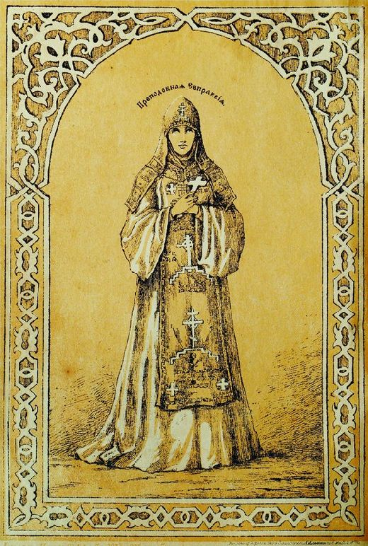 Прмц. Евпраксия Псковская. Хромолитография. Мастерская А. Ильина. 1873 г.